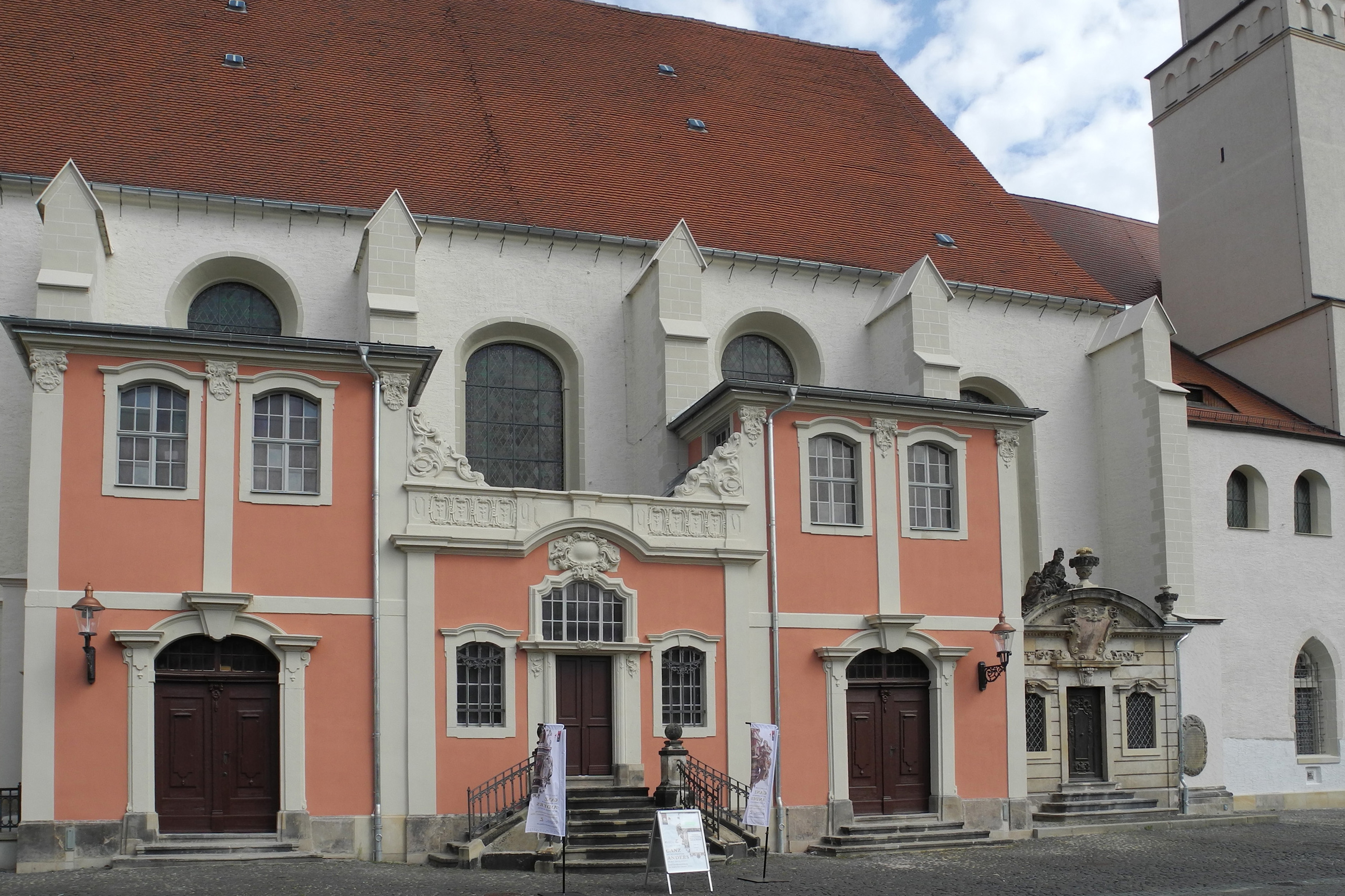 Klosterkirche in Zittau, ehem. Kirche des Franziskanerklosters